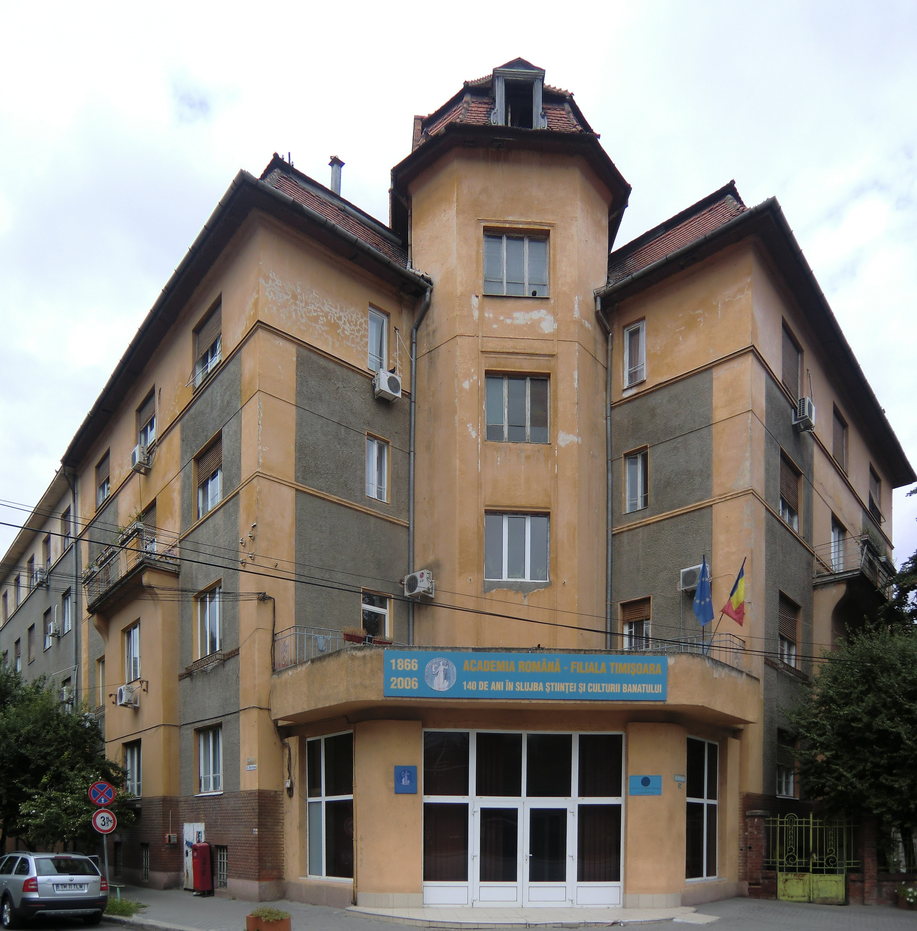 Academia Romana. Filiala Timisoara